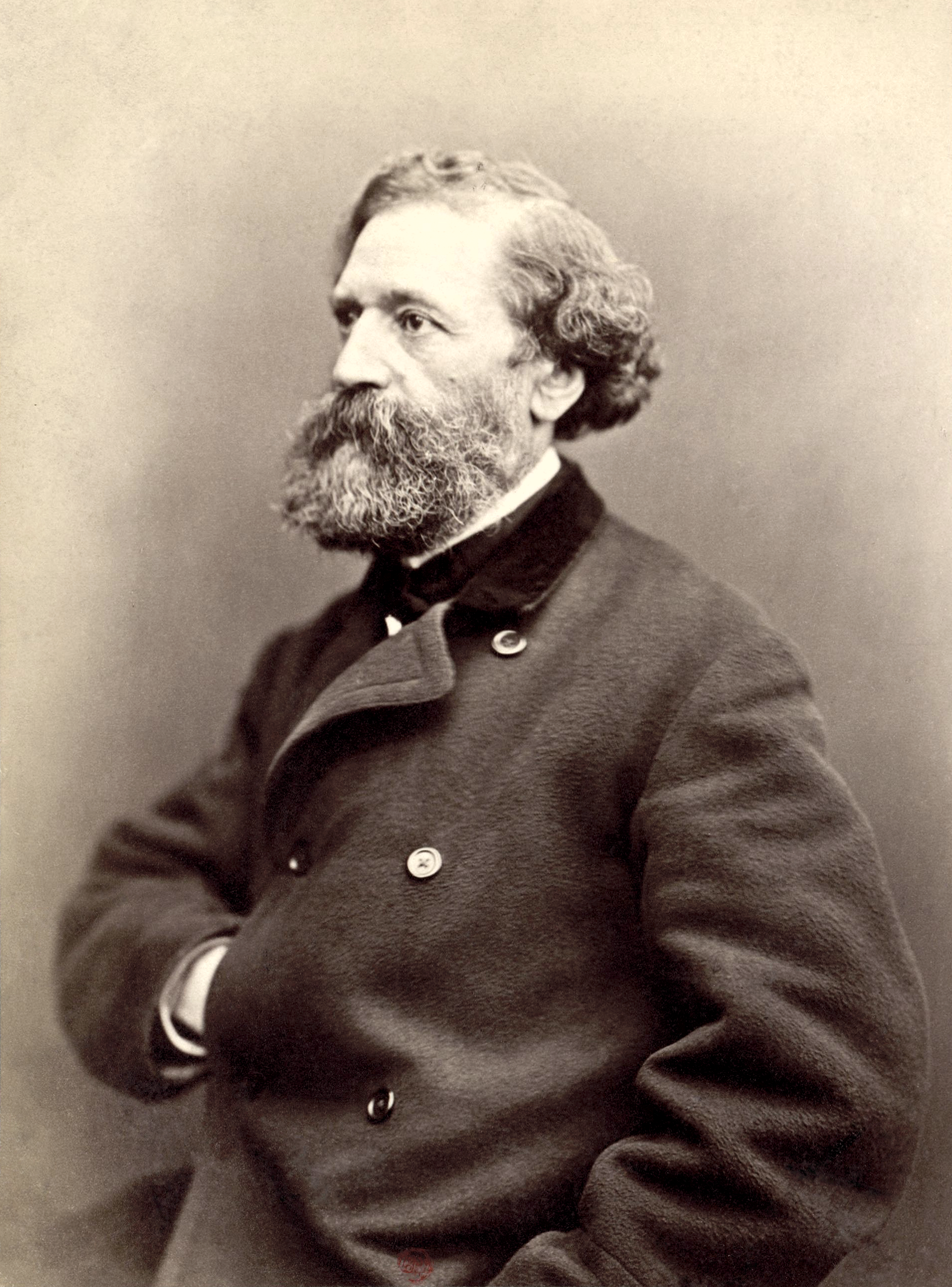 Félix Pyat (1810–1889), French journalist and politician.